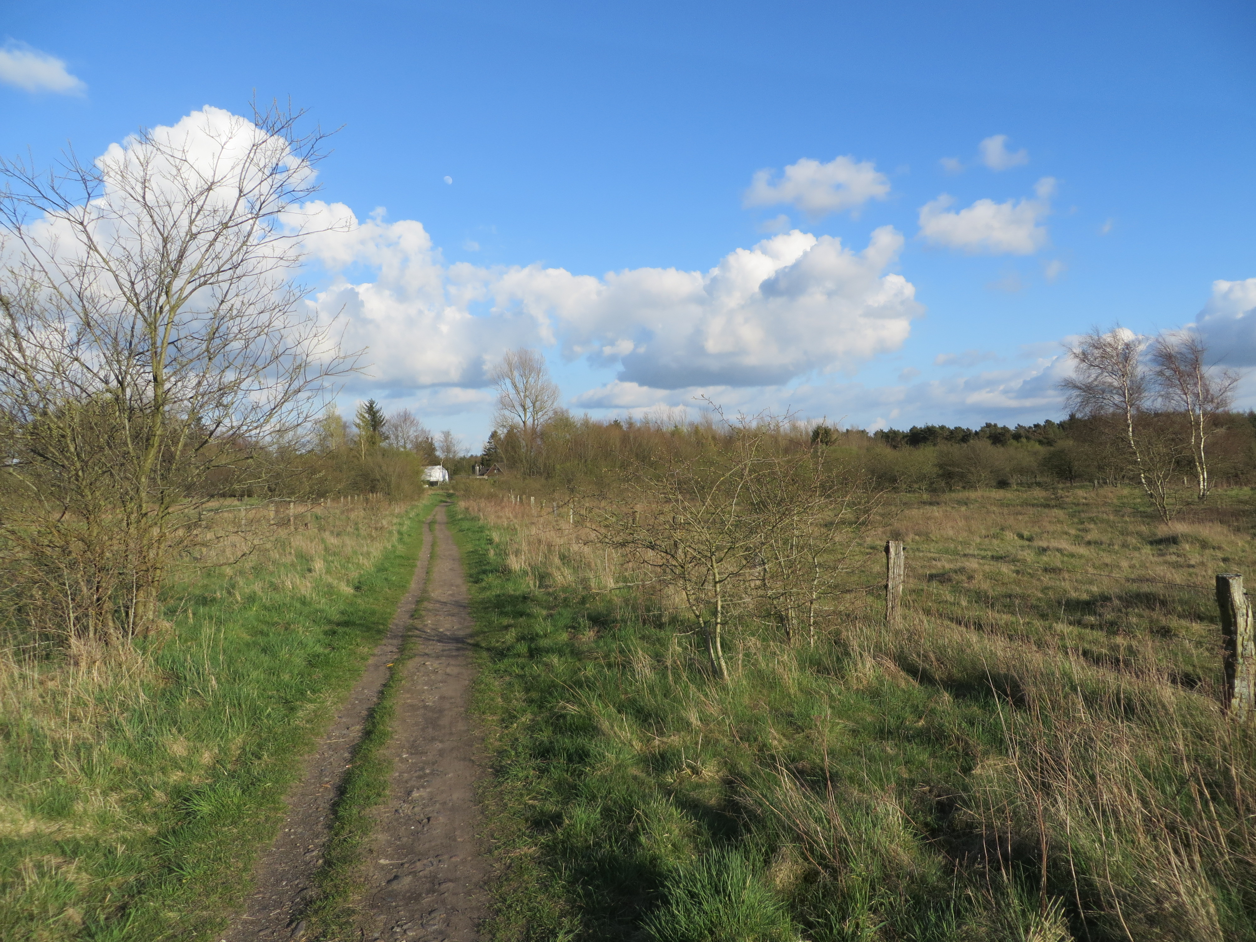 Ungefähre Position vom Weinberg wo die Hoenborg gewesen sein soll (Flensburg 2014)